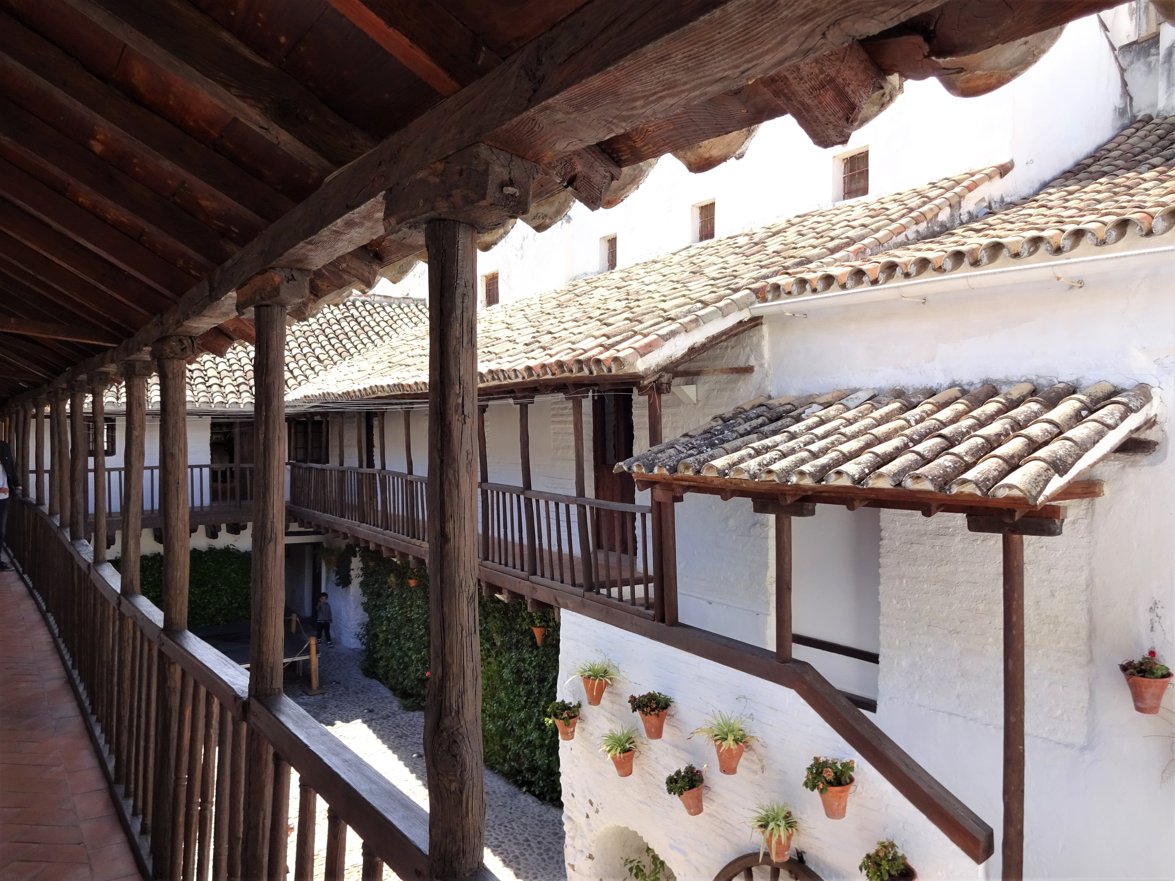 Innenhof des Posada del Potro, Cordoba